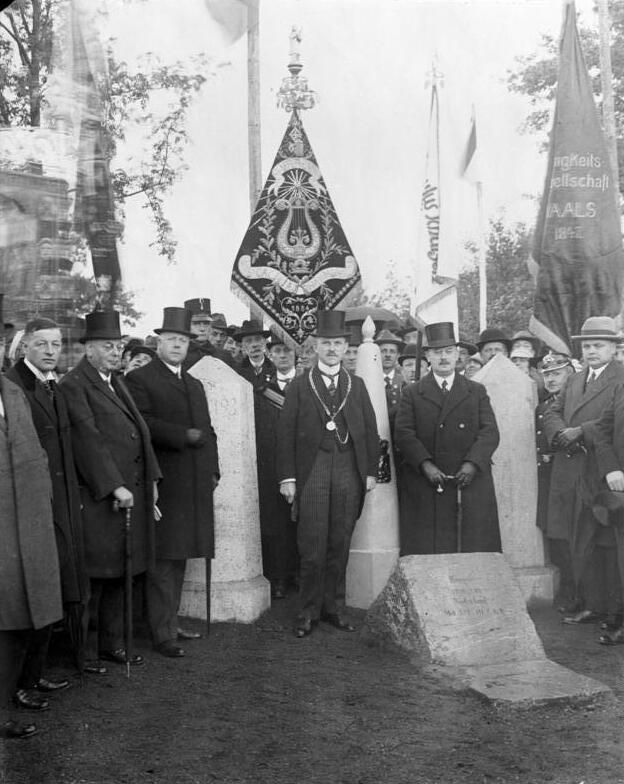 Einweihung eines eigenartigen Grenzdenkmals an der deutsch-holländisch-belgischen Grenze in Vaals b/Aachen! Das Grenzdenkmal besteht aus drei Steinen, welche früher an der deutsch-holländisch-belgischen Grenze gestanden haben. Bei der neuen Grenziehung sind die drei Steine durch einen ersetzt worden. Die Gemeinde Vaals hat nun abseits von der Grenze die alten Steine als geschichtliche Sehenswürdigkeit wieder aufgerichtet. Unser Bild zeigt die Einweihung dieses eigenartigen Grenzdenkmals.